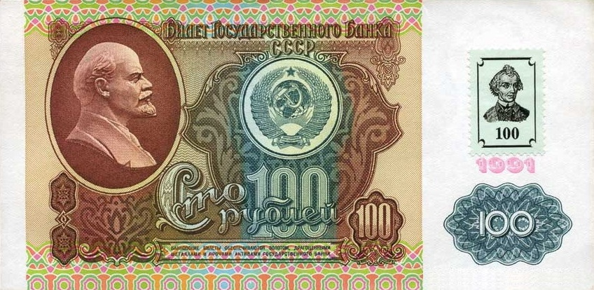 Приднестровье 100 рублей 1992?-1994 аверс. 100 рублей РФ образца 1991 года выпуска 1992 с наклеенной приднестровской гербовой маркой с номиналом 100 руб.